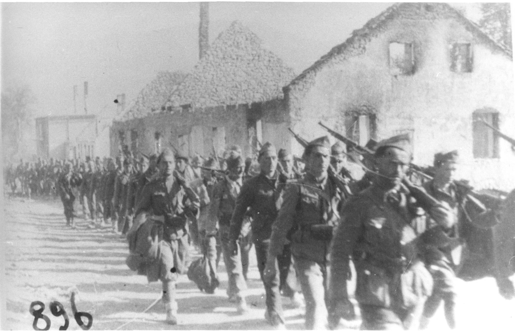 Srpskohrvatski / српскохрватски: Ulazak partizanskih jedinica u spaljenu Drežnicu oktobra 1942. posle osovinske ofanzive.